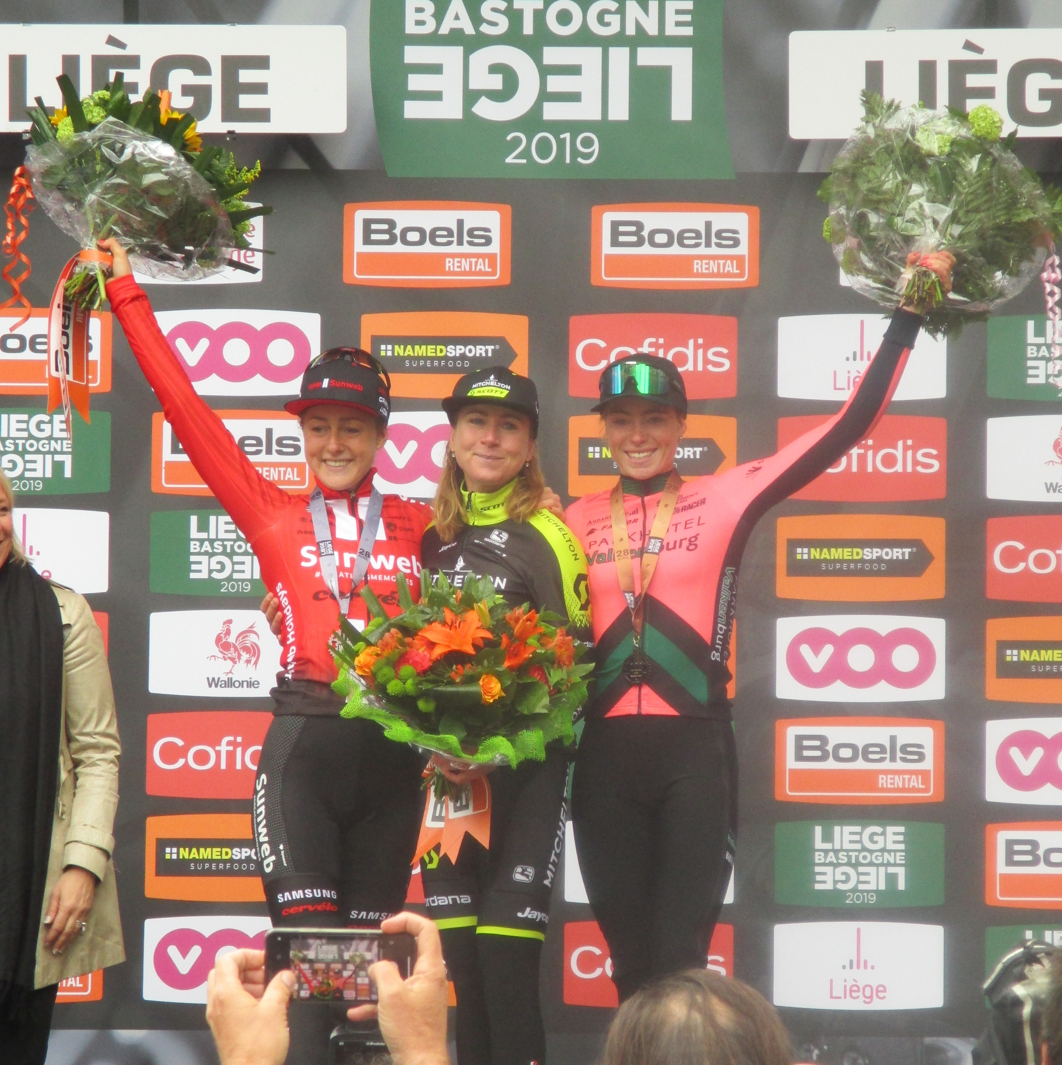 Podium van Luik-Bastenaken-Luik 2019 voor vrouwen: 1. Annemiek van Vleuten; 2. Floortje Mackaij; 3. Demi Vollering.